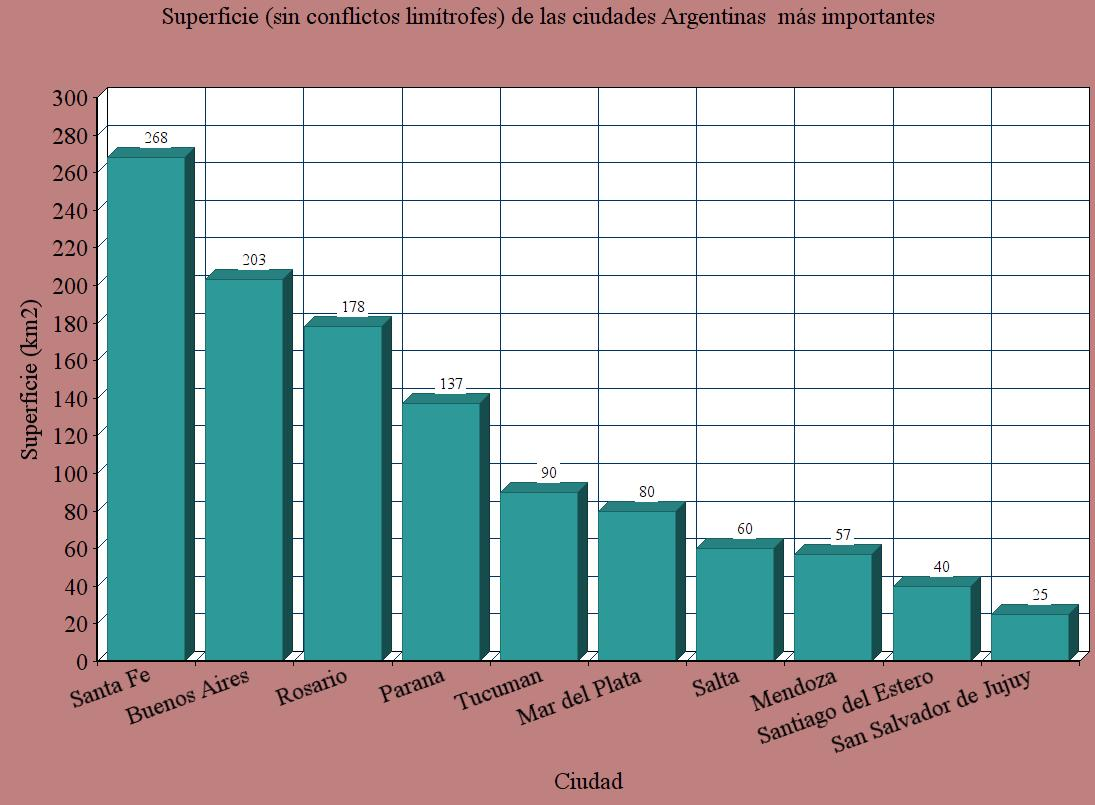 Grafico comparativo sobre extension territorial de las ciudades que no poseen conflictos limitrofes, mas importantes de la Republica Argentina.